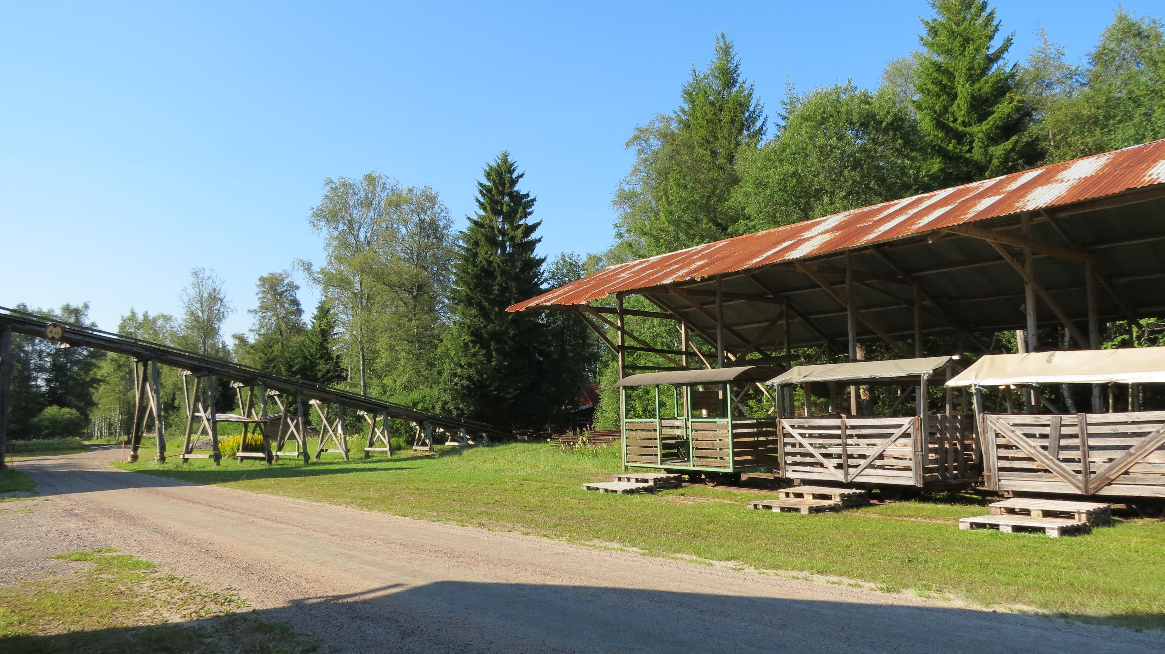 Ryttarens torvströfabrik. Falköping, Kättilstorp